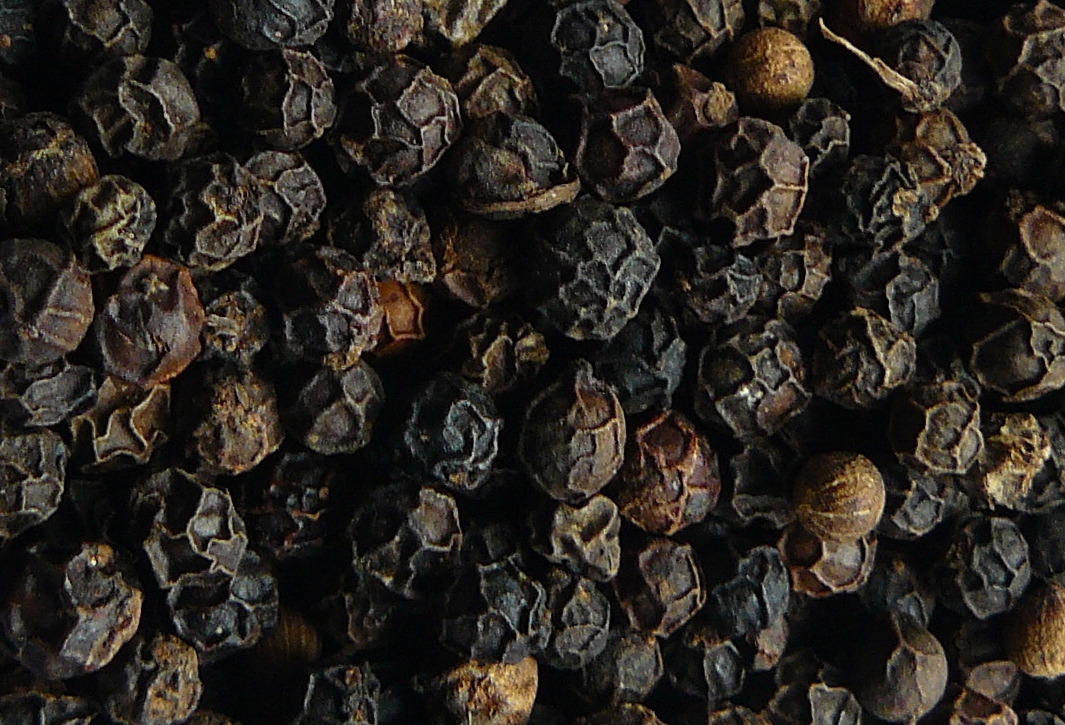 grains de poivre noir d'origine Sarawak